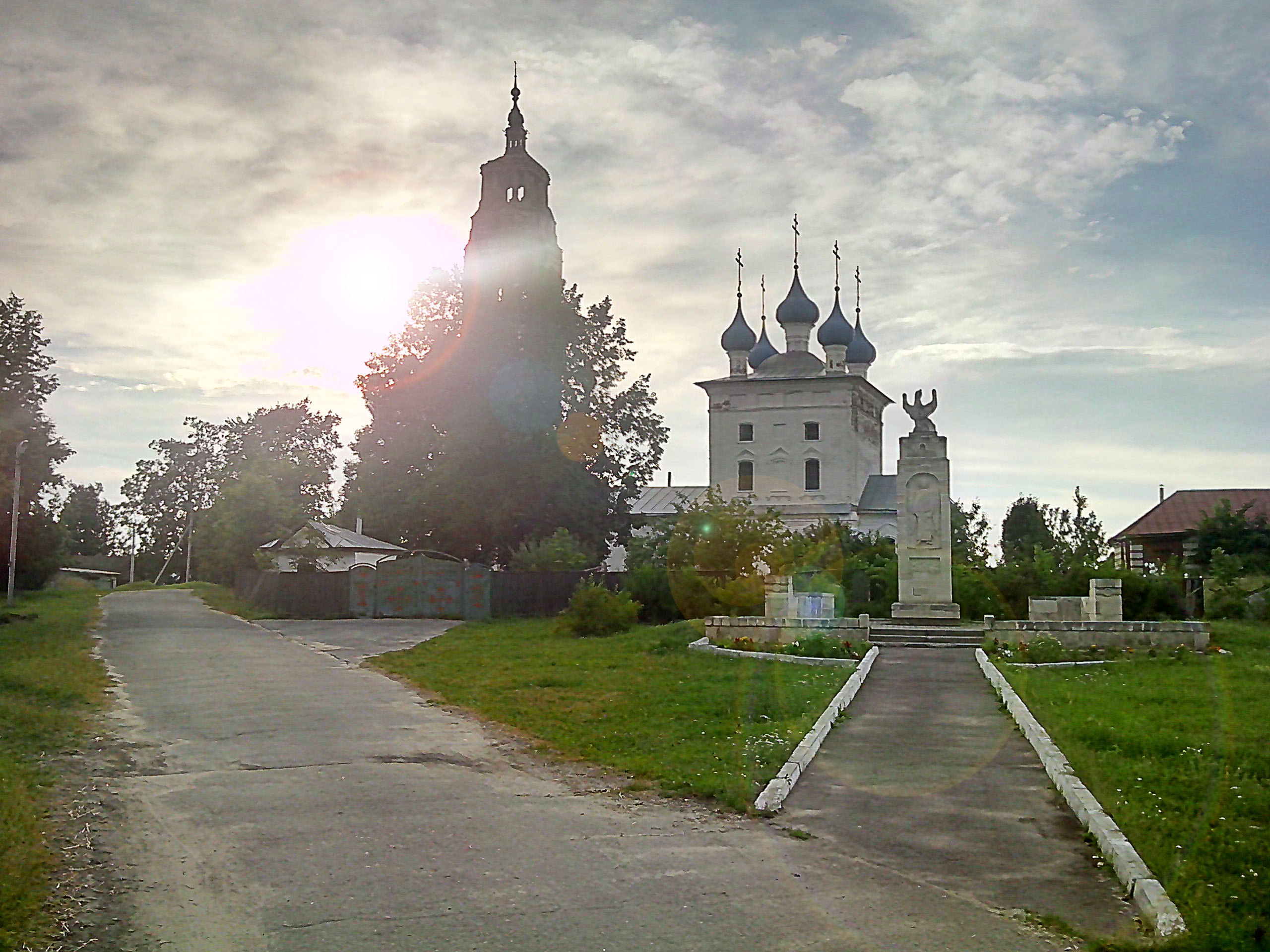 Церковь Покрова Богородицы (Владимирская область, Ковров, Ковровский р-н, село Клязьминский Городок)